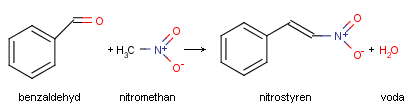 Reakční schéma syntézy nitrostyrenu z benzaldehydu a nitromethanu